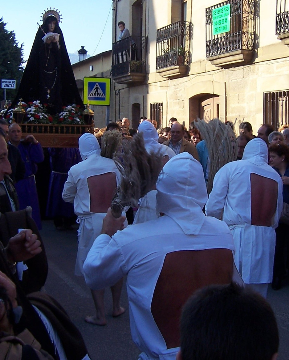 Disciplinantes golpeándose frente a la Virgen. San Vicente de la Sonsierra. La Rioja (España)